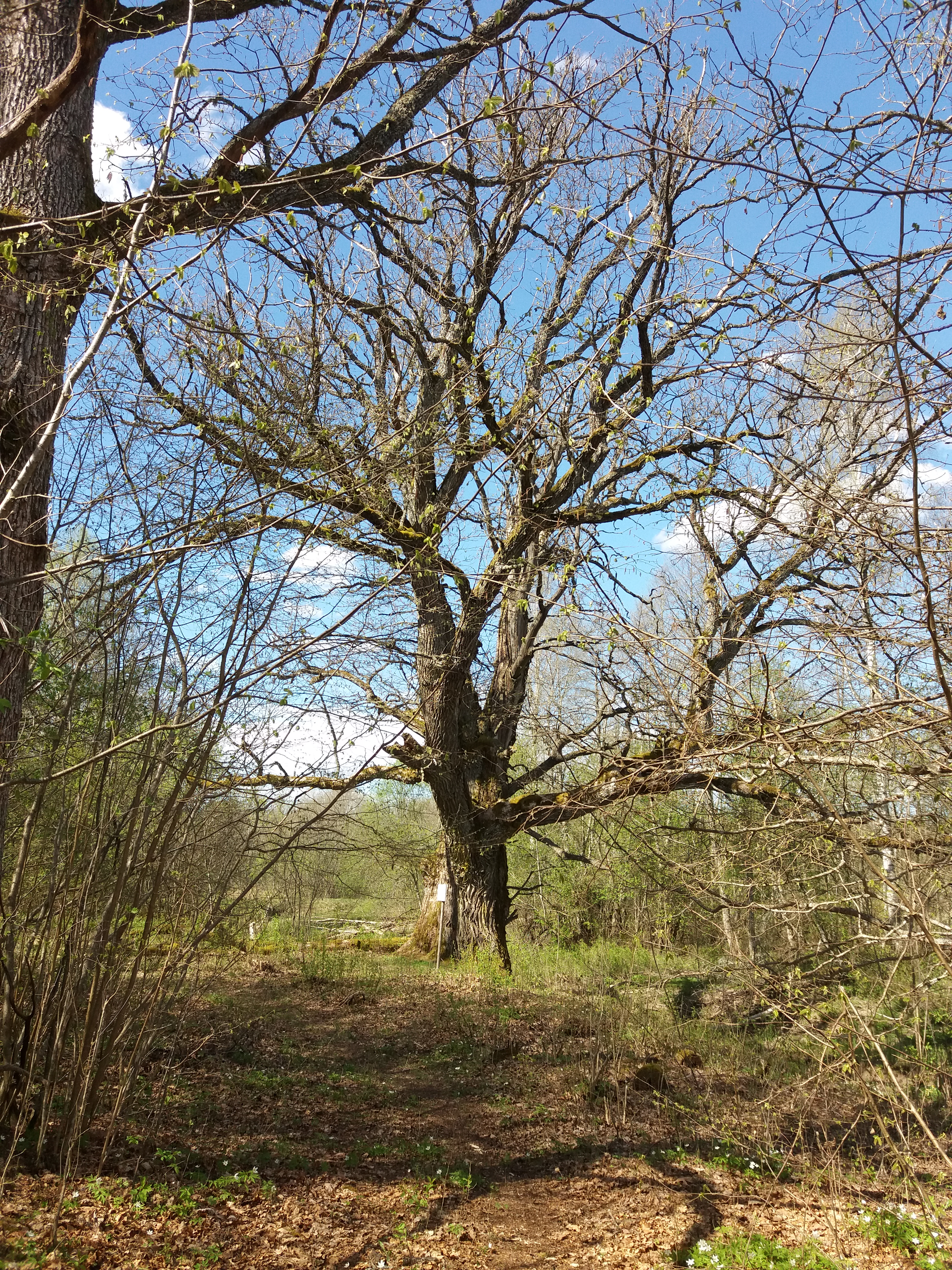 Upsi tamm